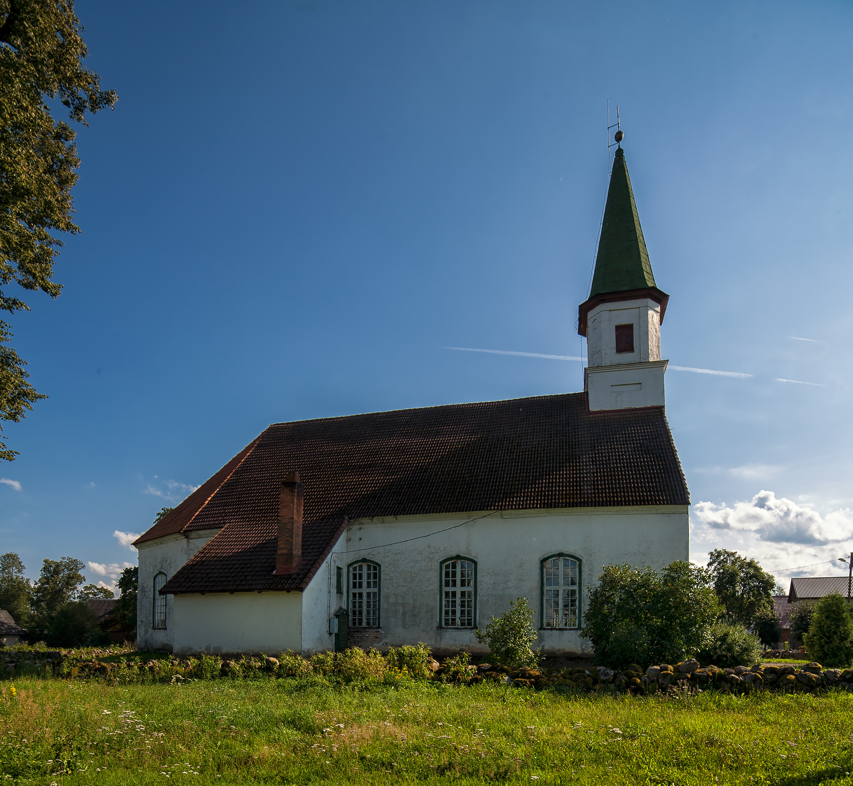 Alojas luterāņu baznīca, Aloja, Baznīcas iela 2